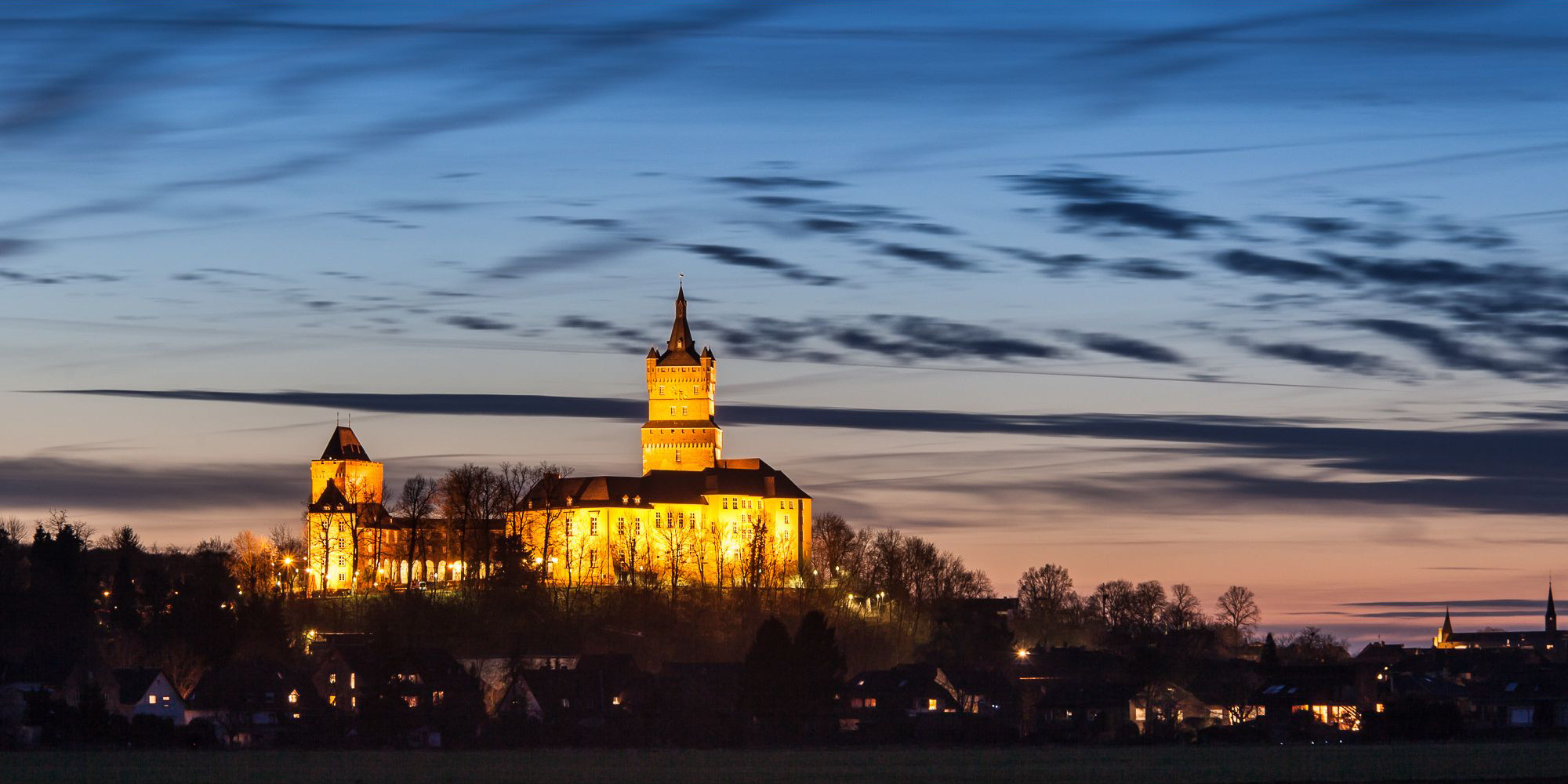 Die Klever Schwanenburg in der Abenddämmerung, Ansicht von Osten